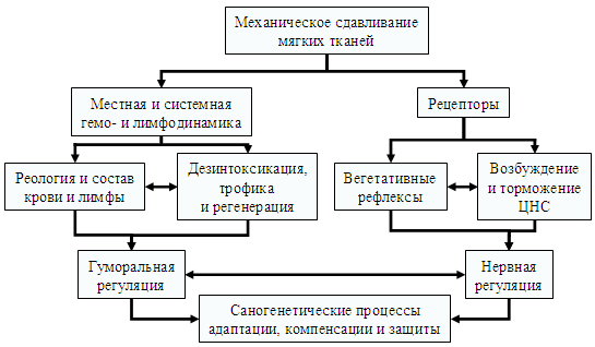 Механізм неспецифічної дії об'ємного пневмопресингу (Д.В. Зайцев, Л.А. Карамзіна, 2015)